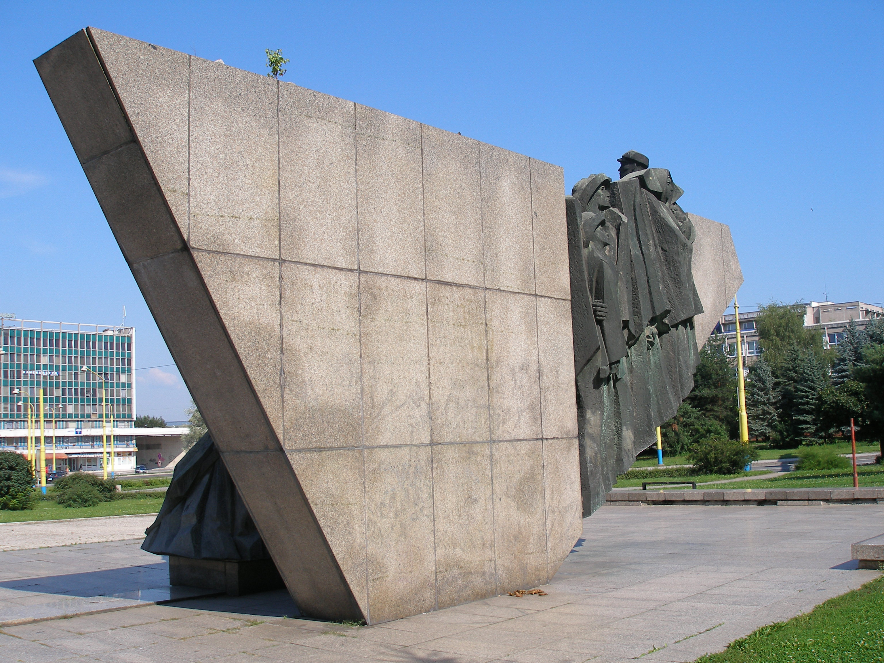 Pamätník Slovenskej republiky rád na Námestí mieru, Prešov. Bol odhalený v roku 1975. Autormi sú akademický sochár Ľ.Korkoš a Ing.architekt O.Černý.